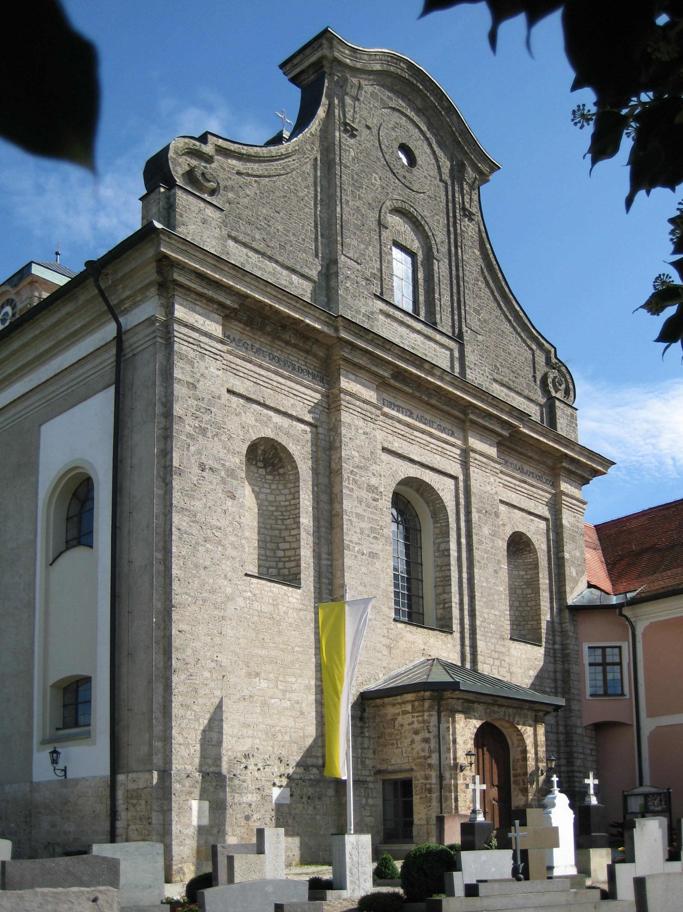 Kloster Asbach